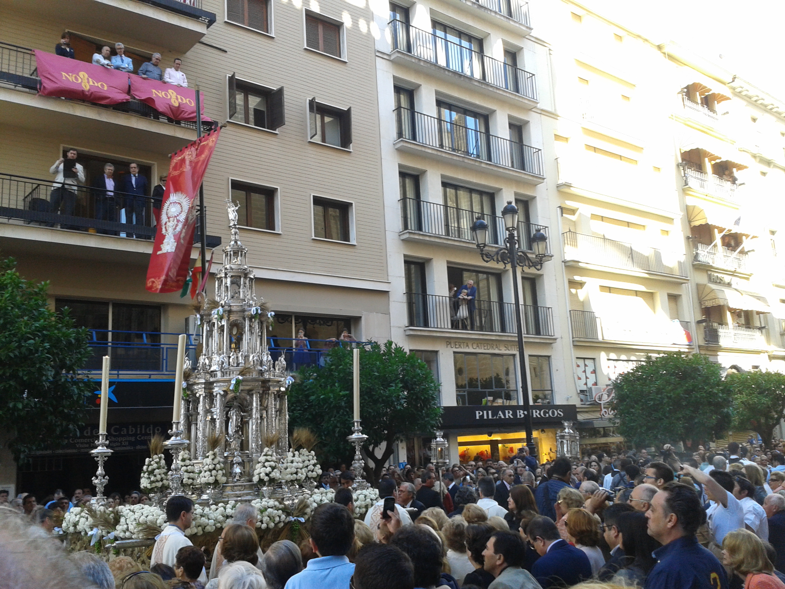 Corpus Christi, Sevilla.